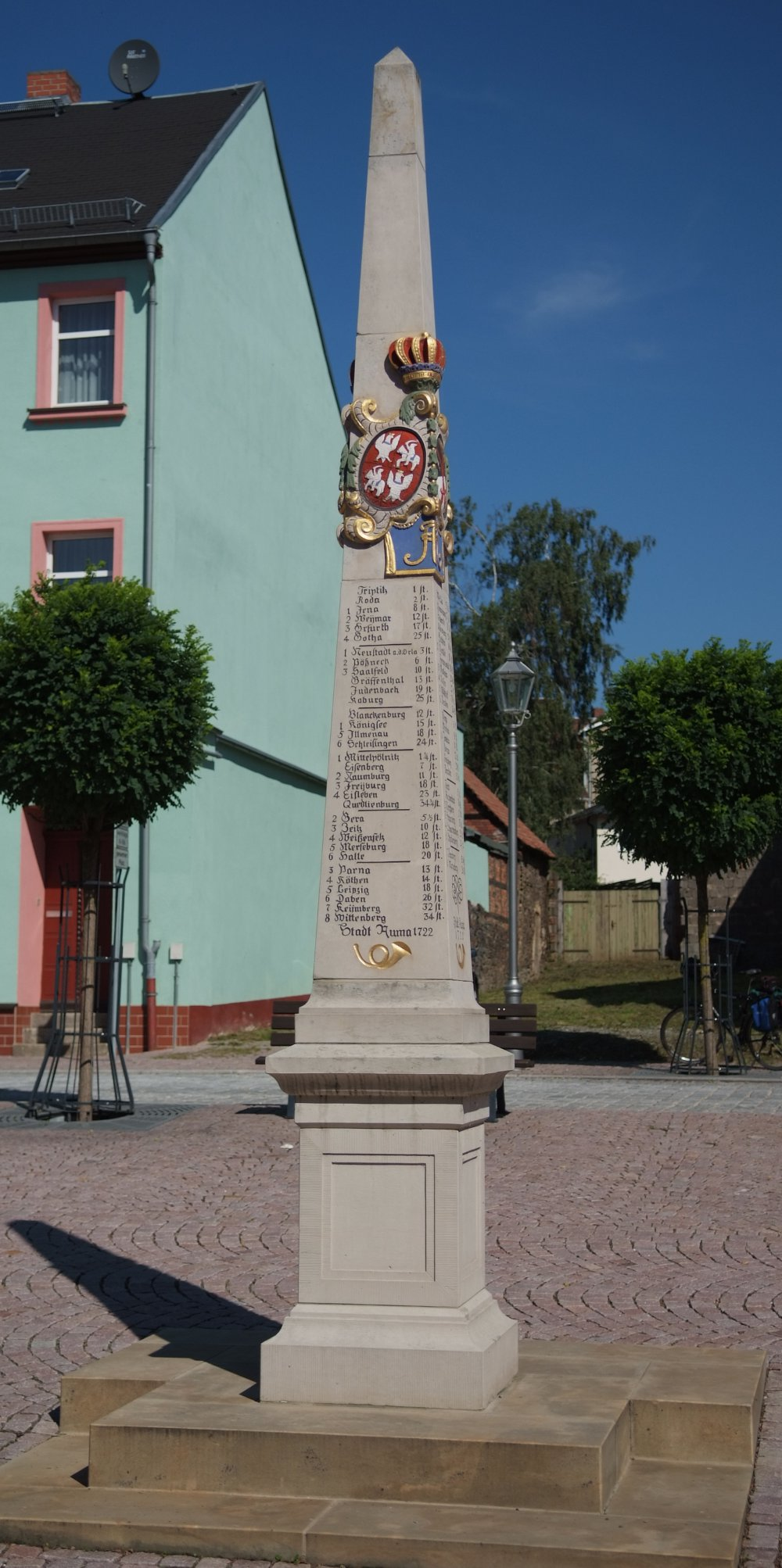 Kursächsische Distanzsäule in Auma von 1722